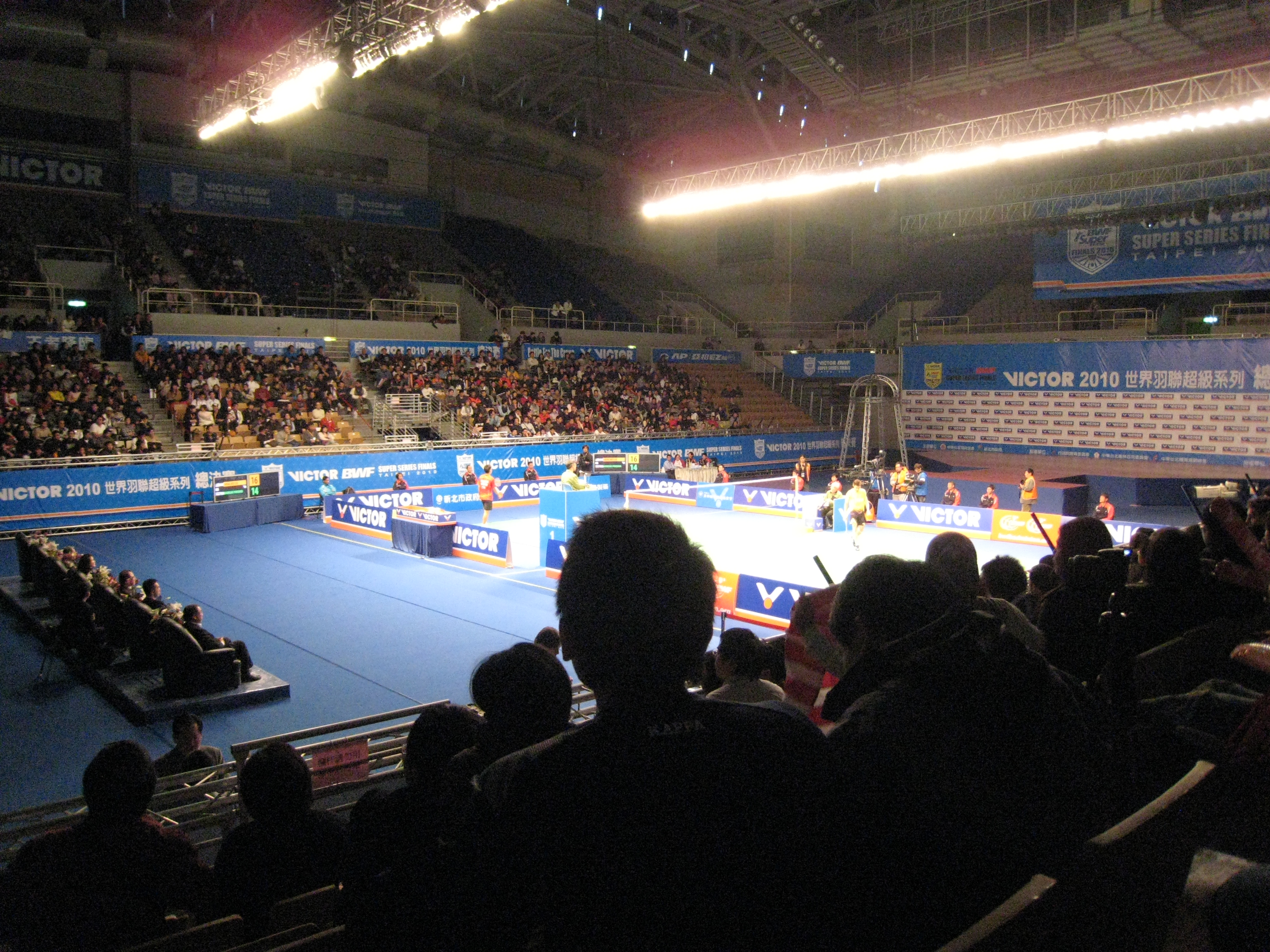 2010年世界羽聯超級系列賽總決賽，新莊體育館內部。